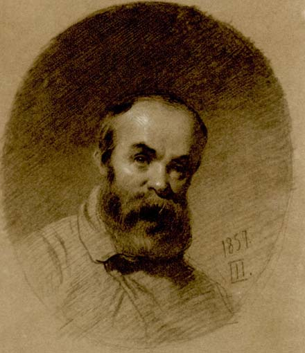 Self-portrait